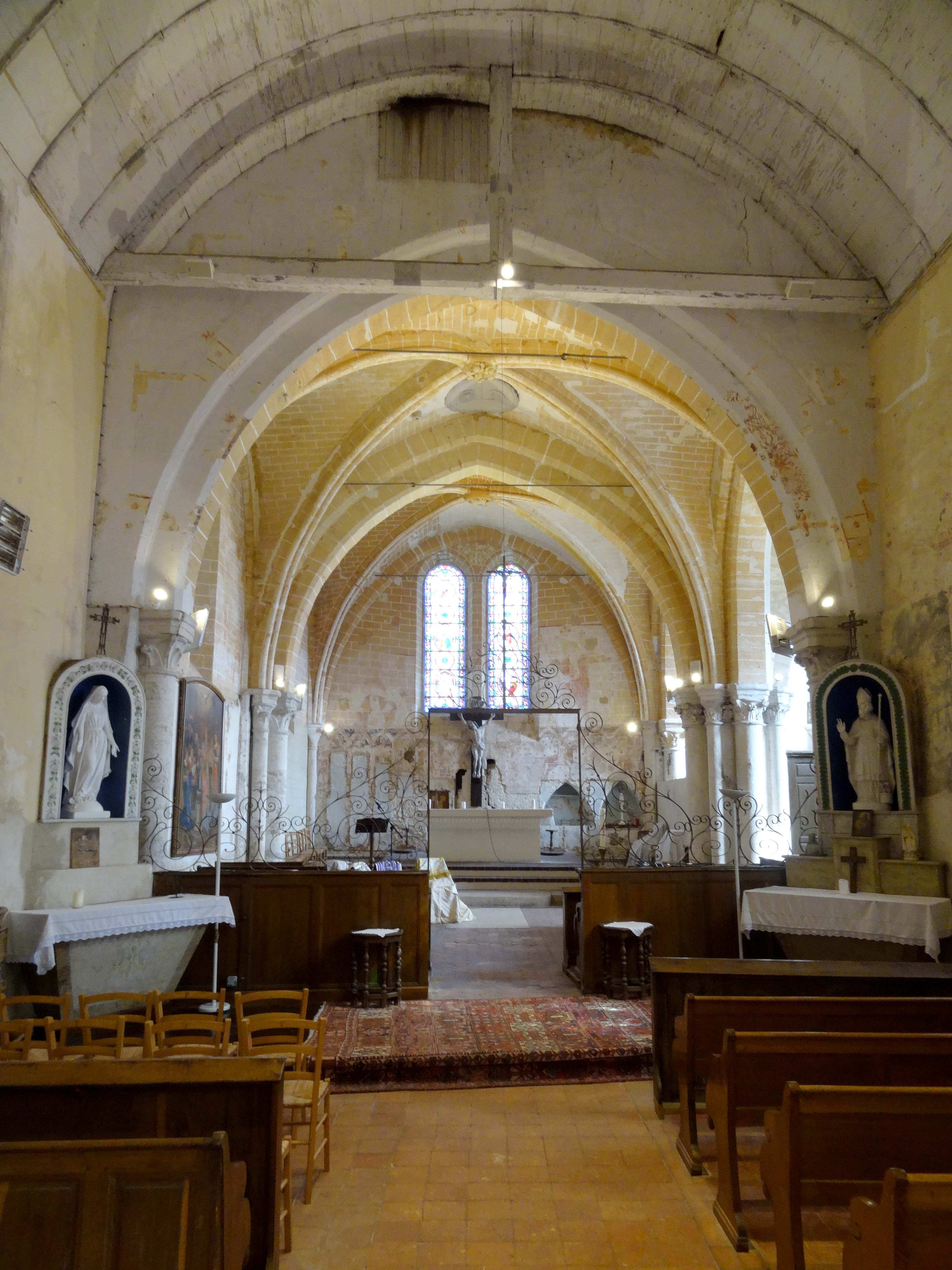 Intérieur de l'église - voir titre.